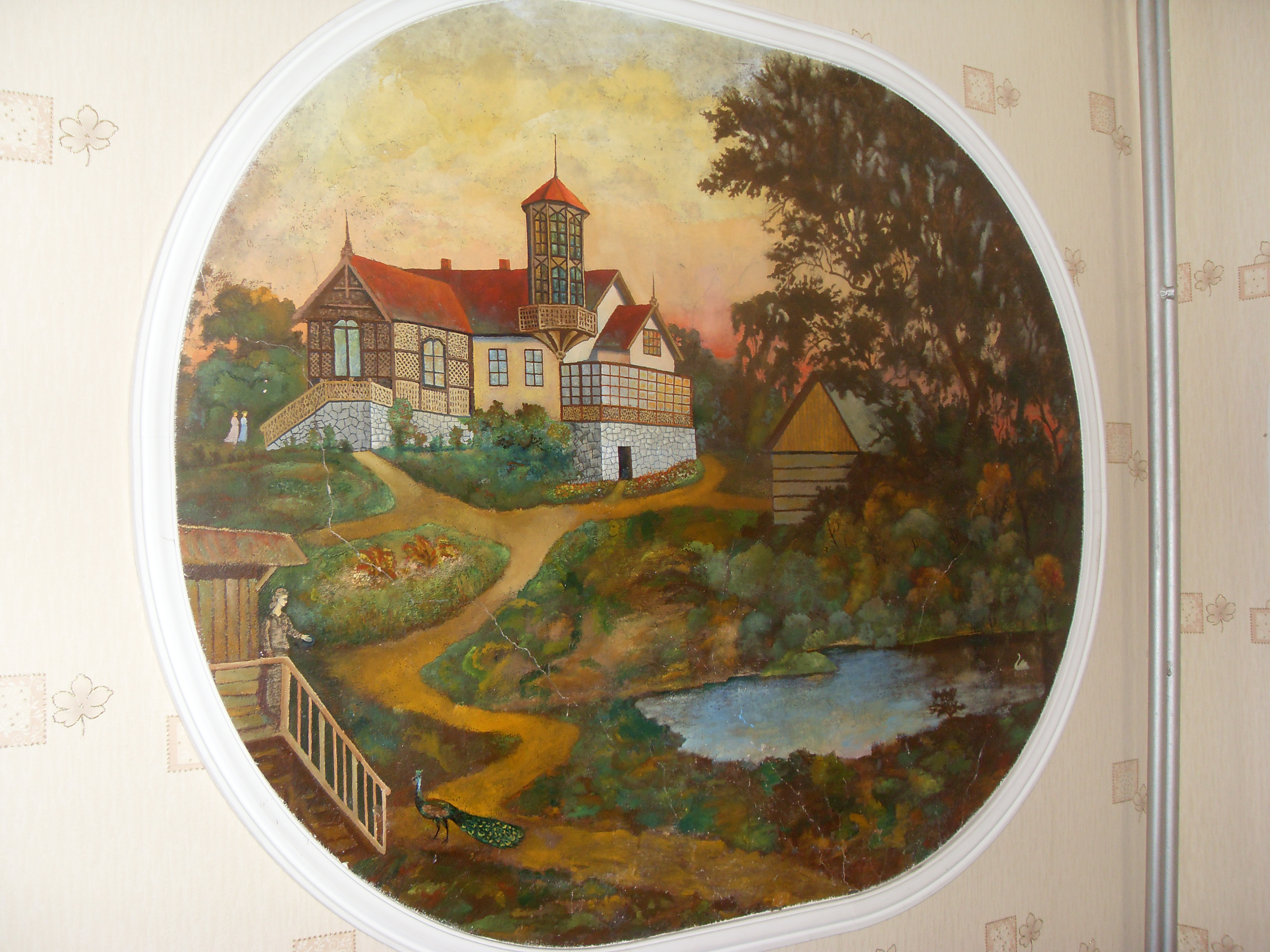 Dwór w Zarzycach Wielkich - malowidło z dworu pokazujące jego dawny wygląd